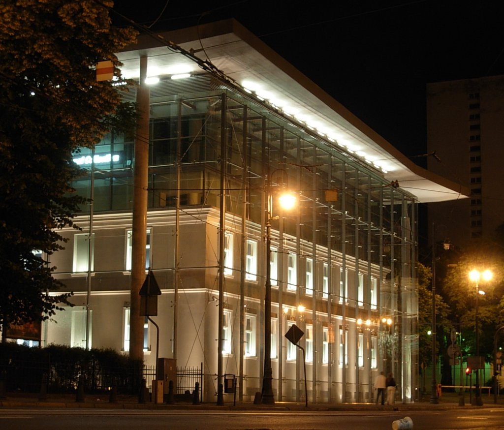 CH "Drukarnia" w Bydgoszczy